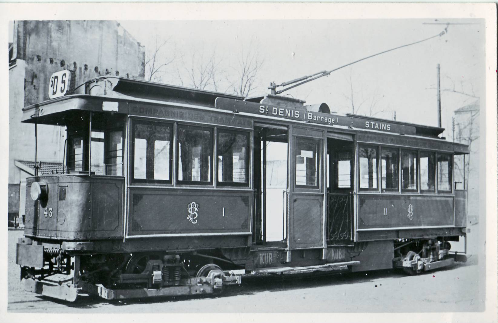 Carte photo ancienne - Motrice 43 des TPDS sur la ligne sDS (Saint-Denis-Barrage - Stains)